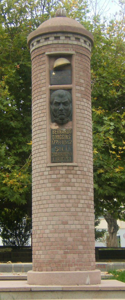 Şili Meydanı üzerindeki Bernardo O'Higgins anıtı